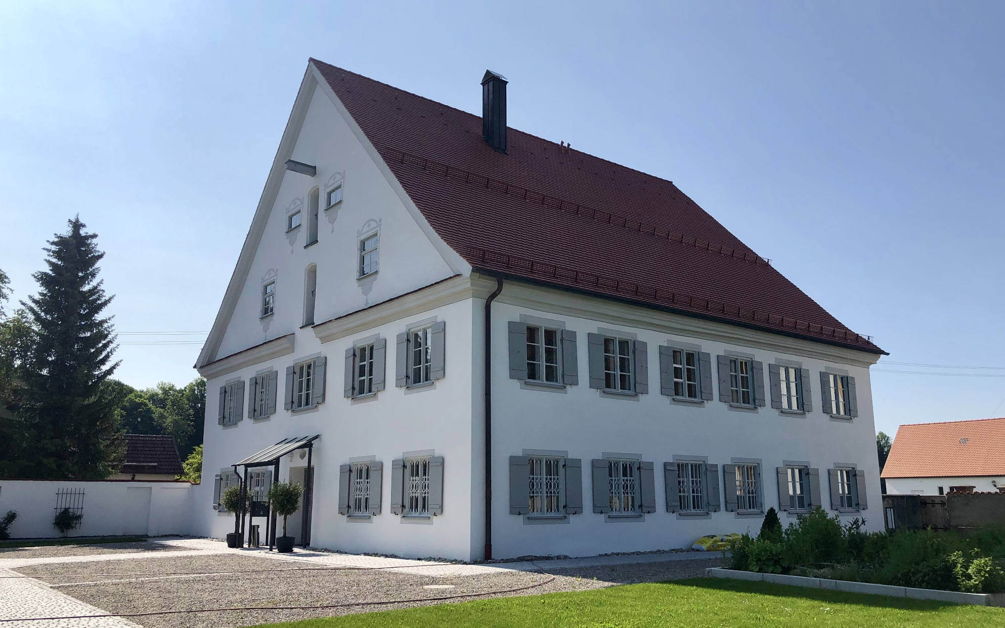 Ehemaliges Pfarrhaus, jetzt Rathaus: stattlicher zweigeschossiger Steilsatteldachbau mit stark profilierten Gesimsen, von Joseph Schmuzer, 1735